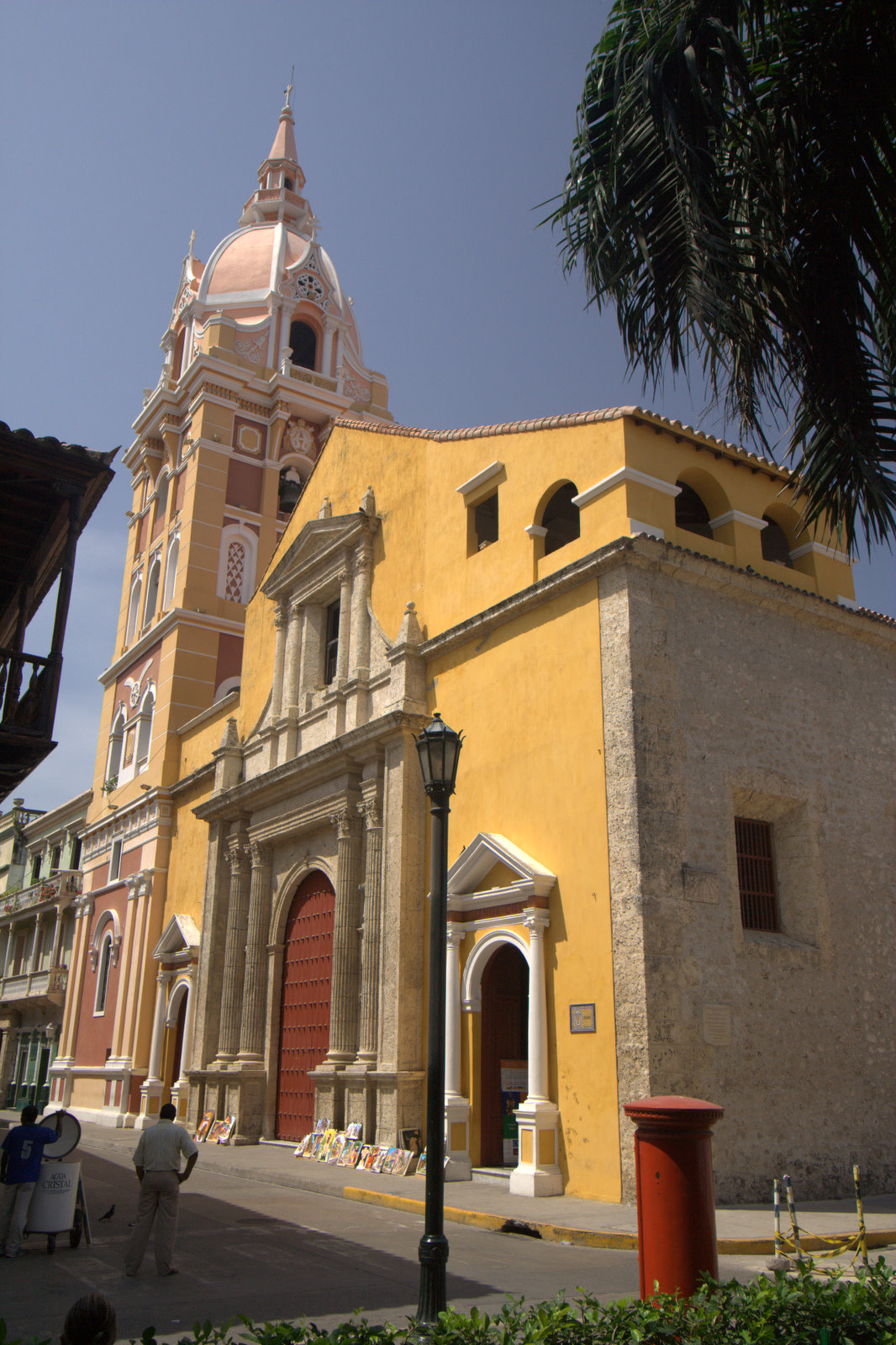 Fachada de la Catedral de Cartagena, Colombia.